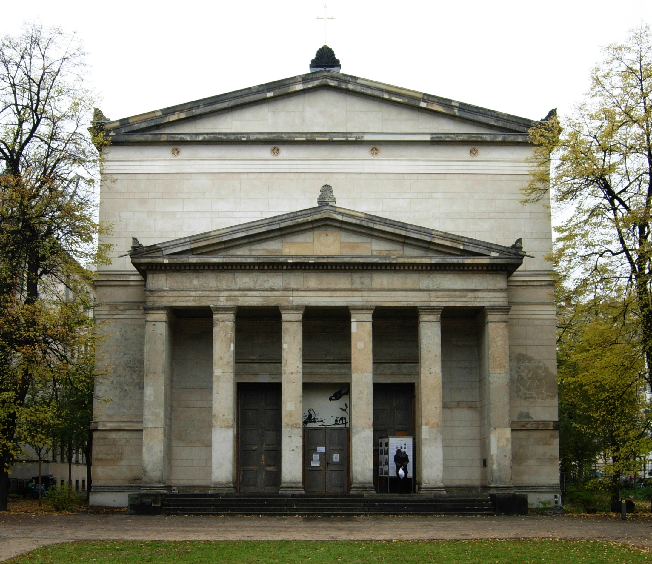 Elisabethkirche, Kirche vor dem Rosenthaler Tor, am östlichen Ende der Invalidenstraße (Nähe Brunnenstraße) in Berlin-Mitte, die größte von vier Vorstadt-Kirchen, die Schinkel im Auftrag Friedrich-Wilhelms III. entworfen hat (die anderen sind Johanniskirche in Moabit, Nazarethkirche in Wedding und Paulskirche in Gesundbrunnen); der restaurierten Elisabethkirche fehlt der alte Schriftzug am Portikus (über den Pfeilern): Des Herrn Wort bleibet in Ewigkeit (1. Petrus 1, 25)